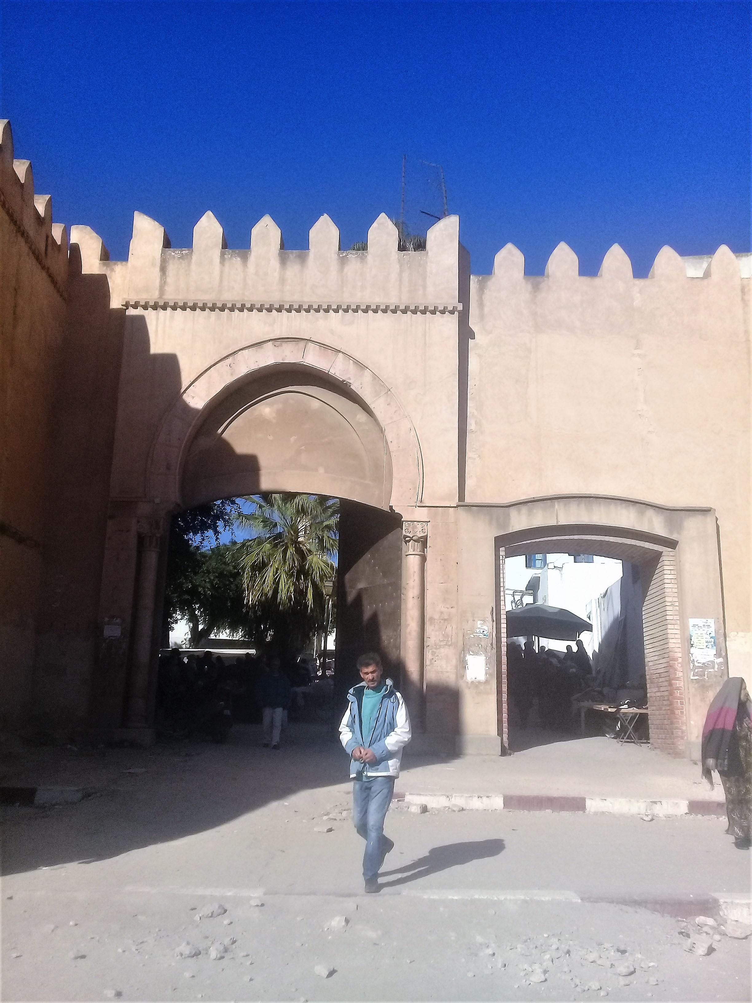 Bab El Kasbah (1) - باب القصبة